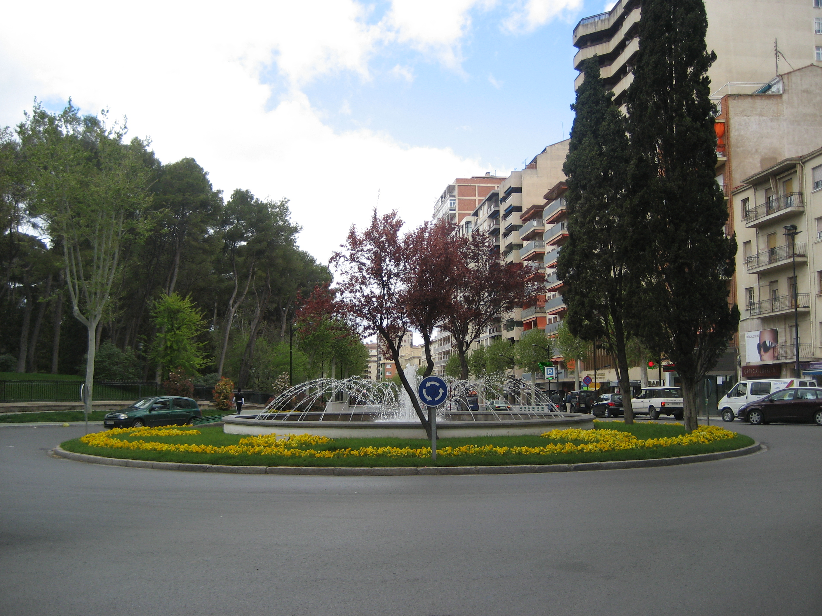 Fuente del Parque Plaza Benjamín Palencia